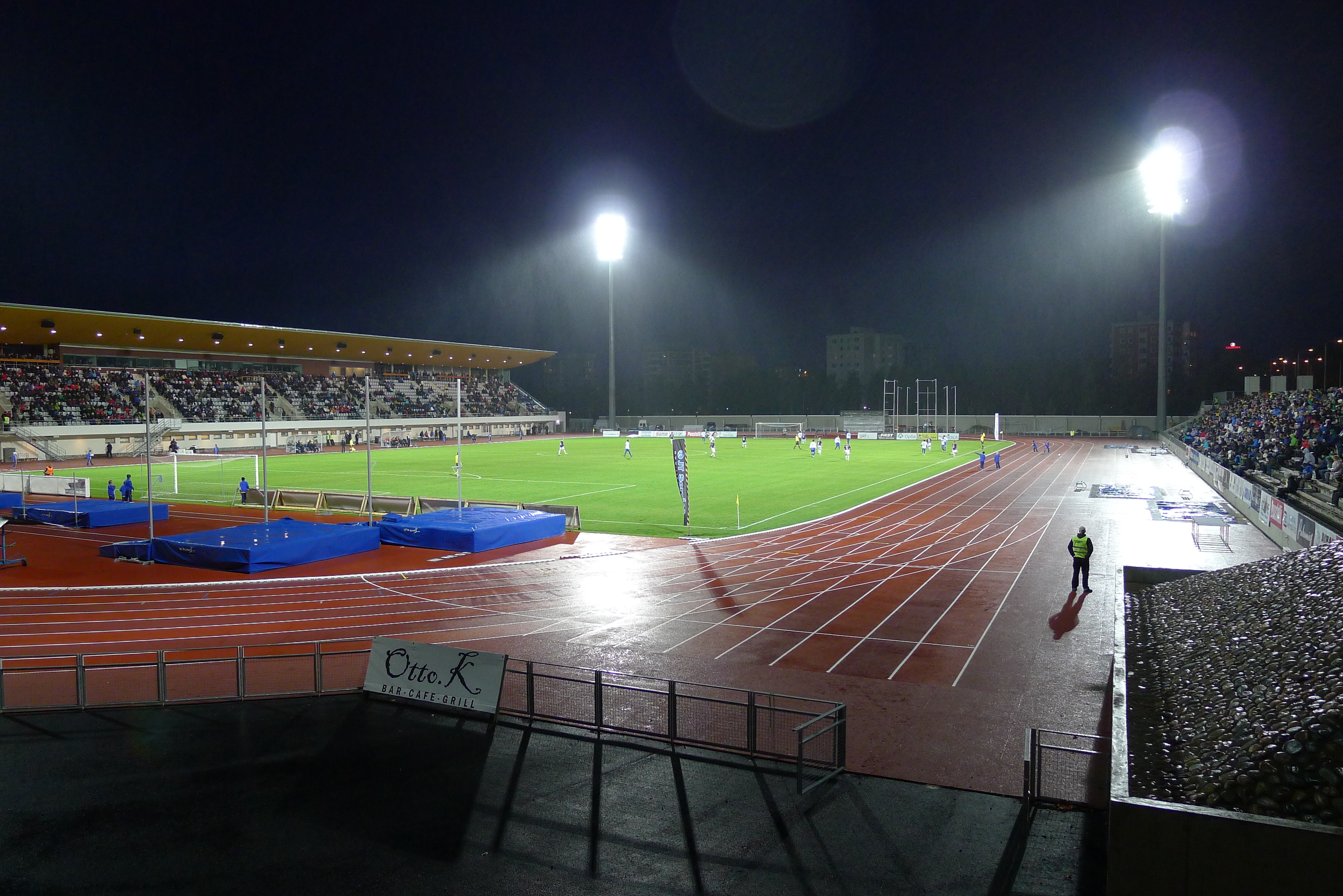 Raatin stadion 21.9.2011